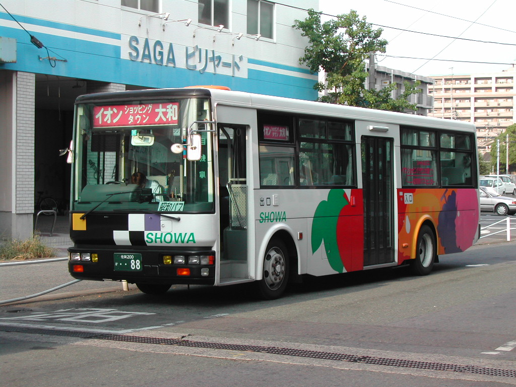 佐賀駅バスセンターにて撮影